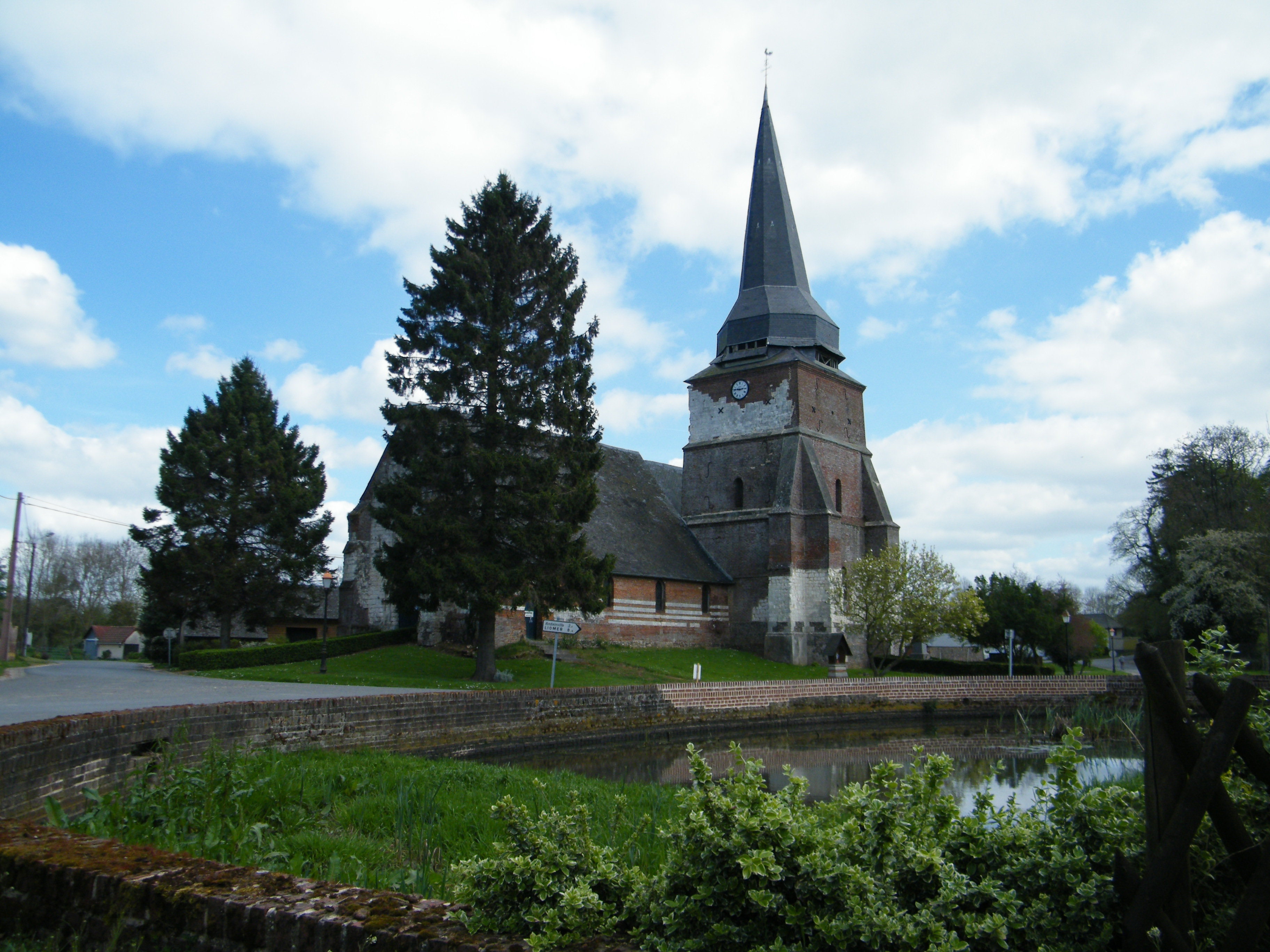 L'église.